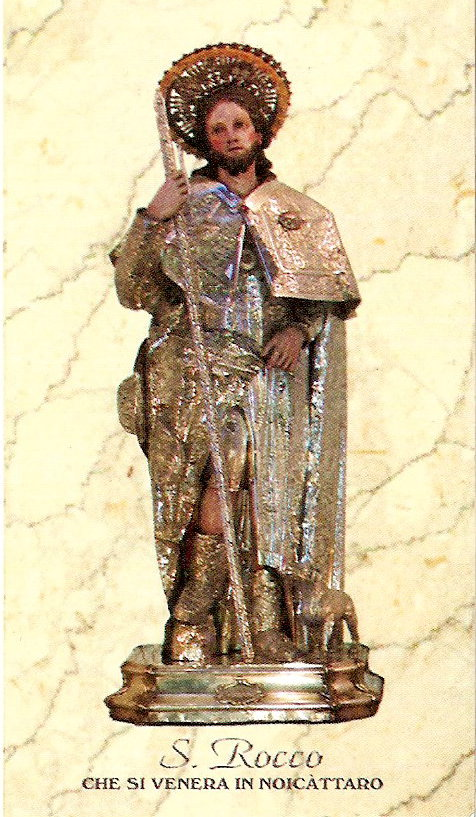 Immagine di San Rocco, venerato a Noicattaro